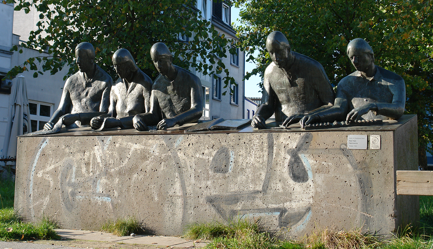 Zigarrenmacher. An einem Tisch sitzen fünf Zigarrenmacher, vor ihnen liegt ein aufgeschlagenes Buch, auf welchem etwas über das Leben und die schweren Arbeitsbedingungen des Berufsstandes zu lesen ist. Aufstellungsort: Buntentorsteinweg. Errichtet: 1984. Material: Halbfiguren, Bronze, 1,85 m x 3,5 m x 0,75 m. Entwurf und Ausführung: Holger Voigts k: kunst im öffentlichen raum bremen